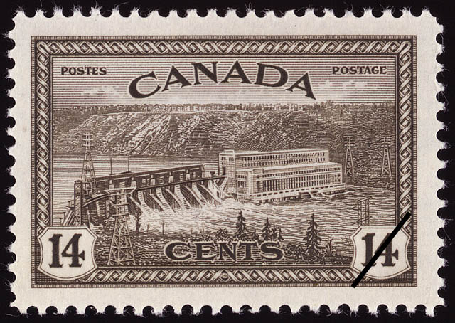 Timbre poste Canada 14 cents. Centrale hydroélectrique 1946. Usine d'énergie hydro-électrique, rivière St-Maurice (Québec). Imprimé par Canadian Bank Note Company. Date d'émission 16 septembre 1946